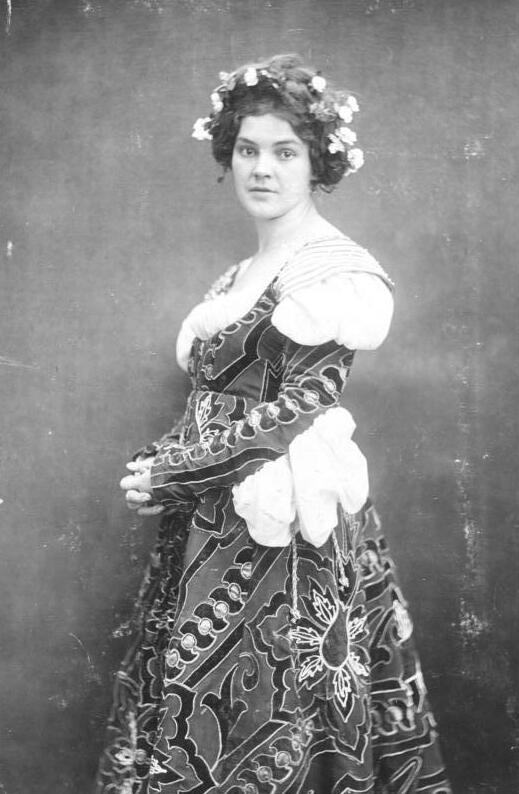 Leopoldine Konstantin Leopoldine Constantin als "Buhlschaft" in dem von Hugo von Hofmannsthal erneuerten alten Stück "Jedermann", das von Reinhardt aufgeführt wird. Abgebildete Personen: Konstantin, Leopoldine: Schauspielerin, Deutsches Theater Berlin, GND 116331577